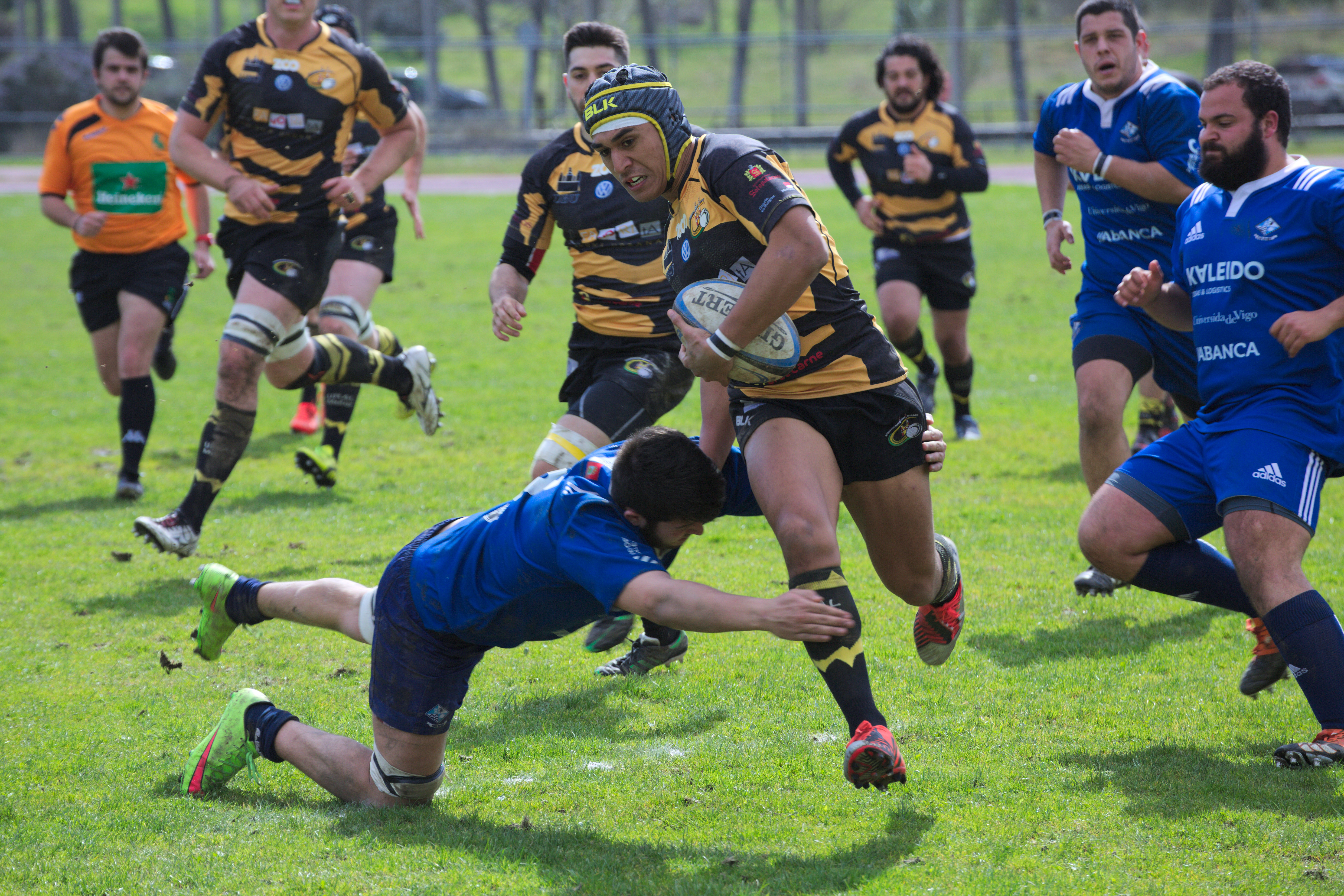 Kaleido Universidade de Vigo RC - UBU Colina Clinic, 12 March 2017 División de Honor B - Grupo A